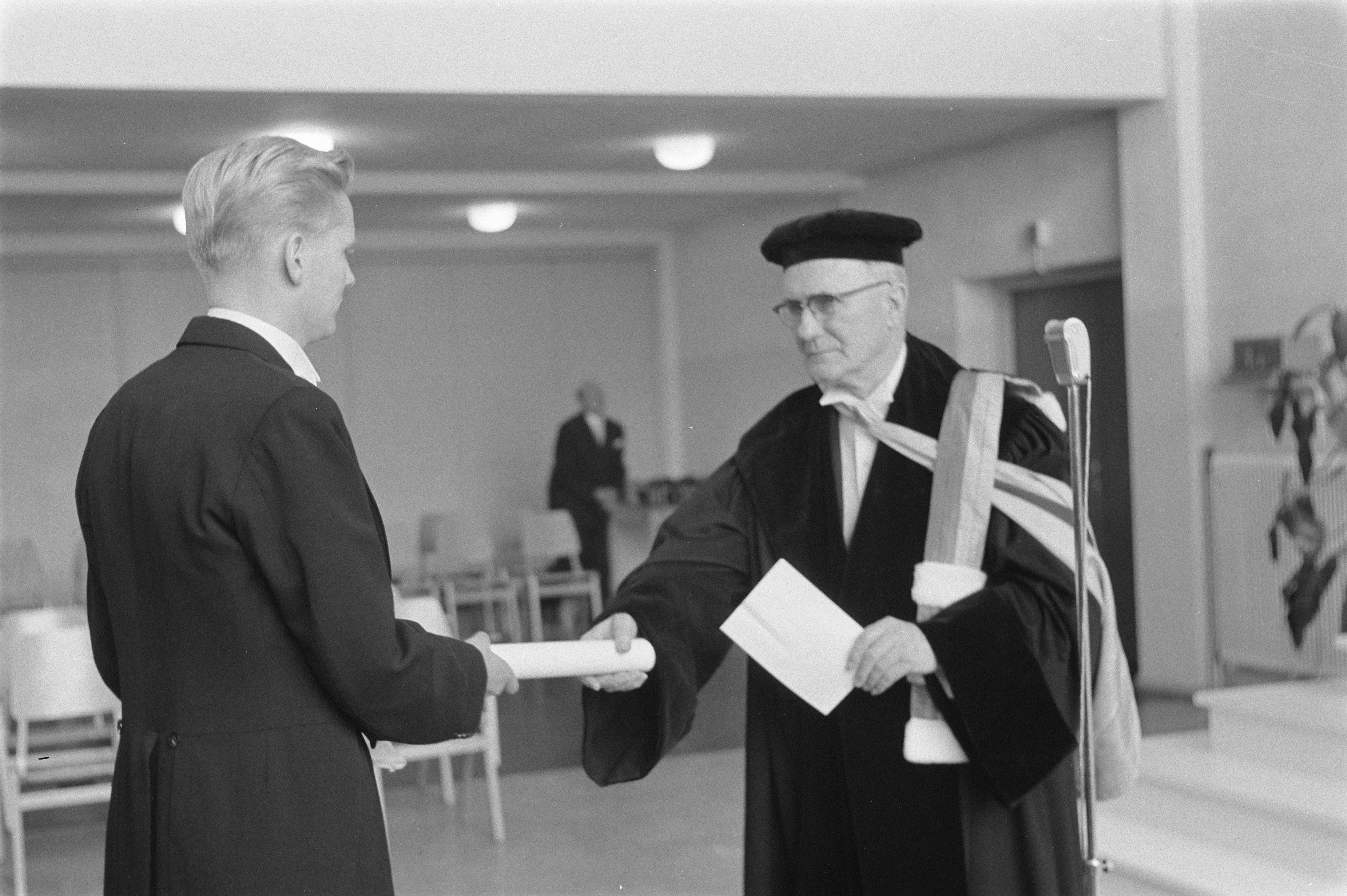 Collectie / Archief : Fotocollectie Anefo Reportage / Serie : [ onbekend ] Beschrijving : Promotie tot dokter in de letter en wijsbegeerte van de 25-jarige Luitenant ter Zee der derde klasse KMR P. J. D. Drenth Datum : 3 juni 1960 Trefwoorden : PROMOTIES, doctors, letteren Persoonsnaam : Drenth, P.J.D. Fotograaf : Pot, Harry / Anefo Auteursrechthebbende : Nationaal Archief Materiaalsoort : Negatief (zwart/wit) Nummer archiefinventaris : bekijk toegang 2.24.01.05 Bestanddeelnummer : 911-3098